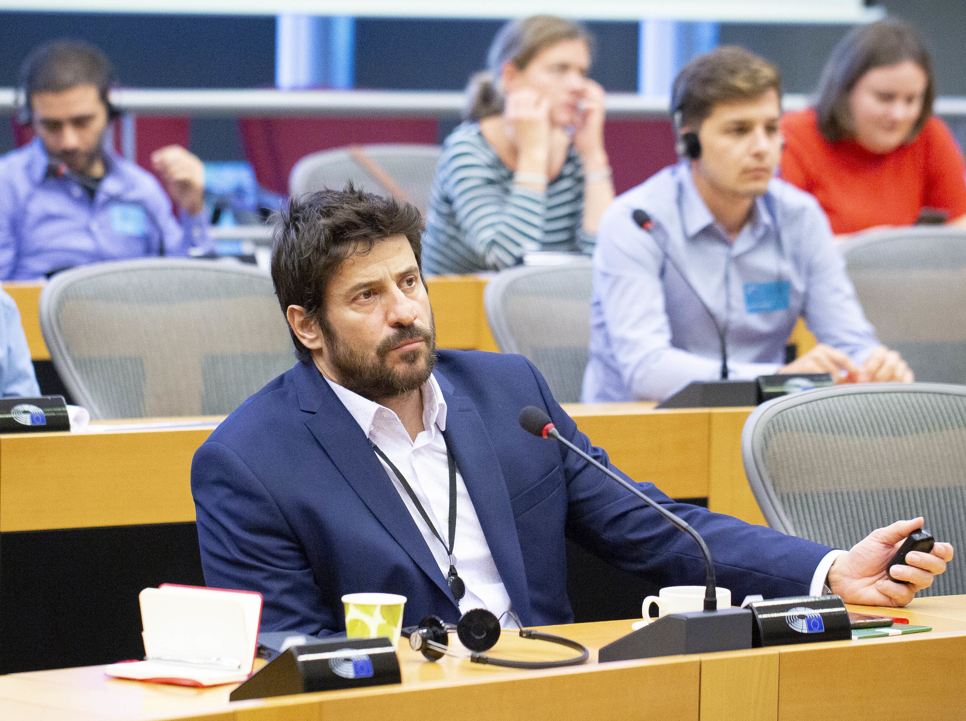 F70A9801